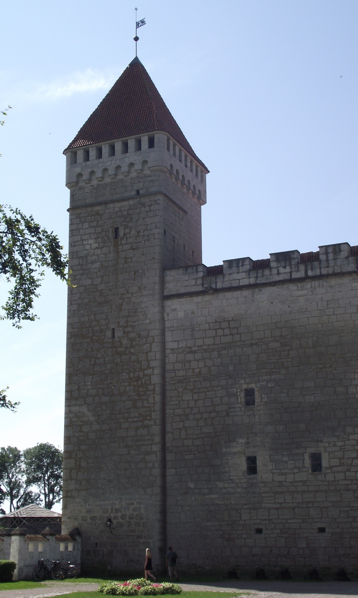 Kuressaare piiskopilinnuse Vahitorn (Pikk Hermann)